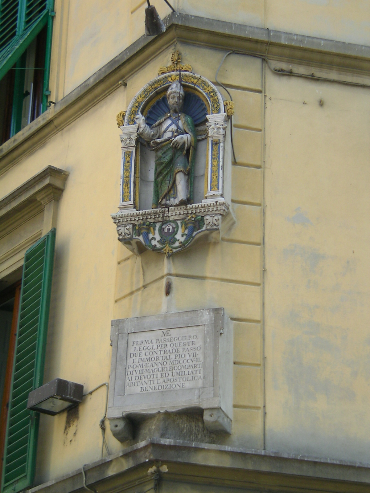 Tabernacolo di Sant'Ambrogio by Giovanni della Robbia front view in Florence, Italy